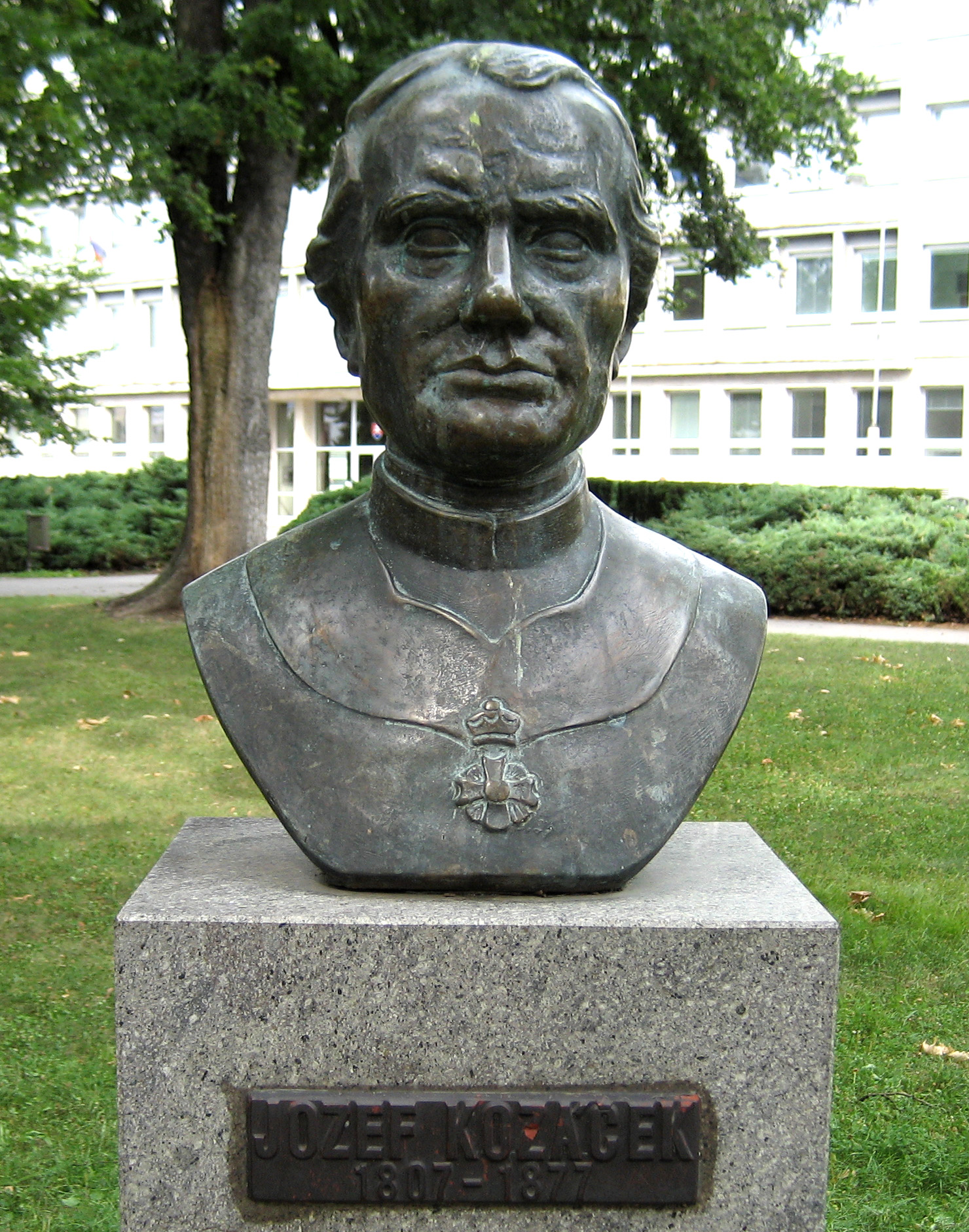 Bronzová busta Jozefa Kozáčeka, kultúrneho pracovníka, cirkevného hodnostara (2. 5. 1807 Zvolen - 26. 3. 1877 Oradea). Patril do druhej generácie bernolákovcov, podporoval aj nár. kult. a politické úsilie štúrovcov, 1847 prispel ku zvoleniu Ľ. Štúra za poslanca uh. snemu za mesto Zvolen.